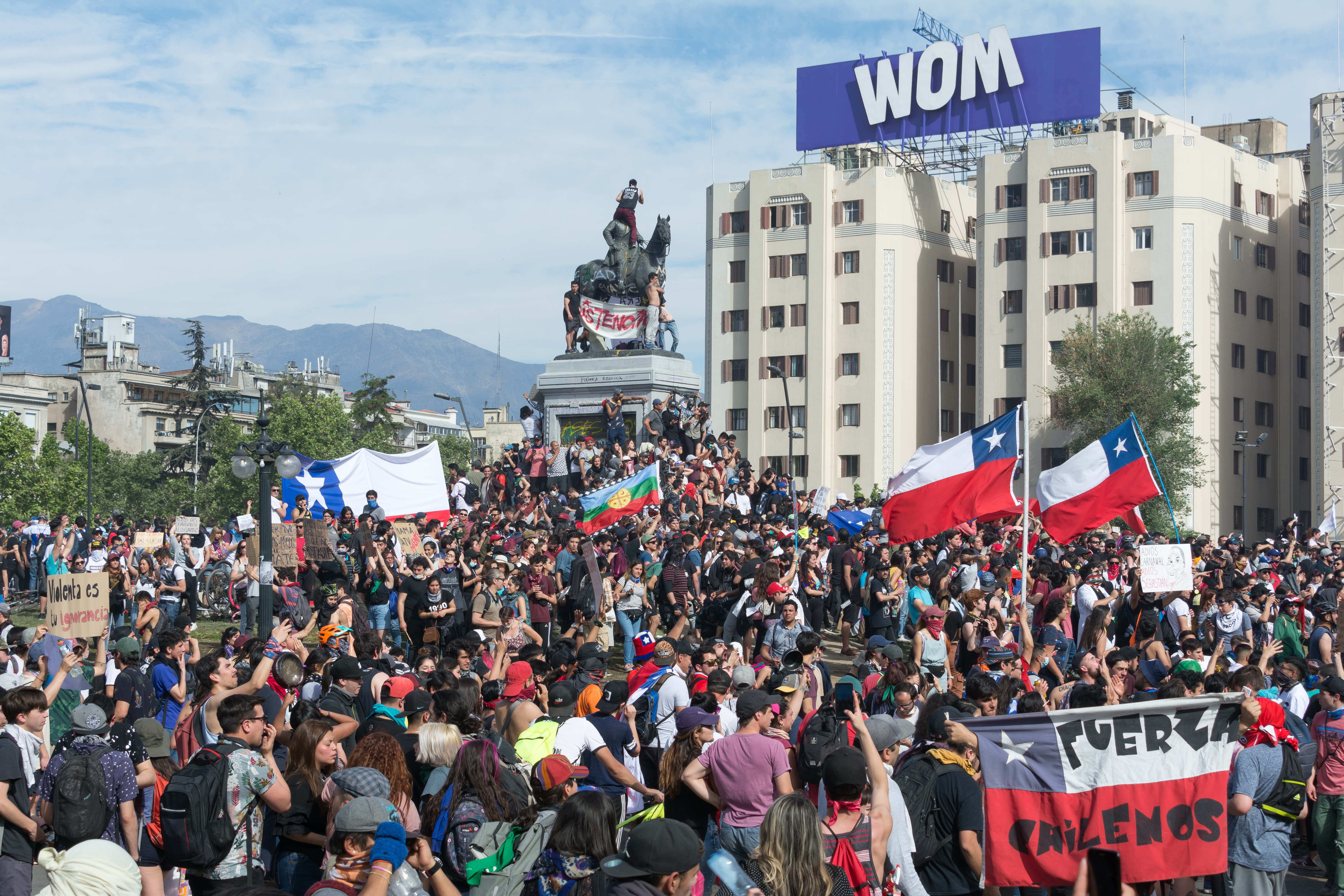 Protestas en Chile de 2019, Plaza Baquedano, Santiago, Chile